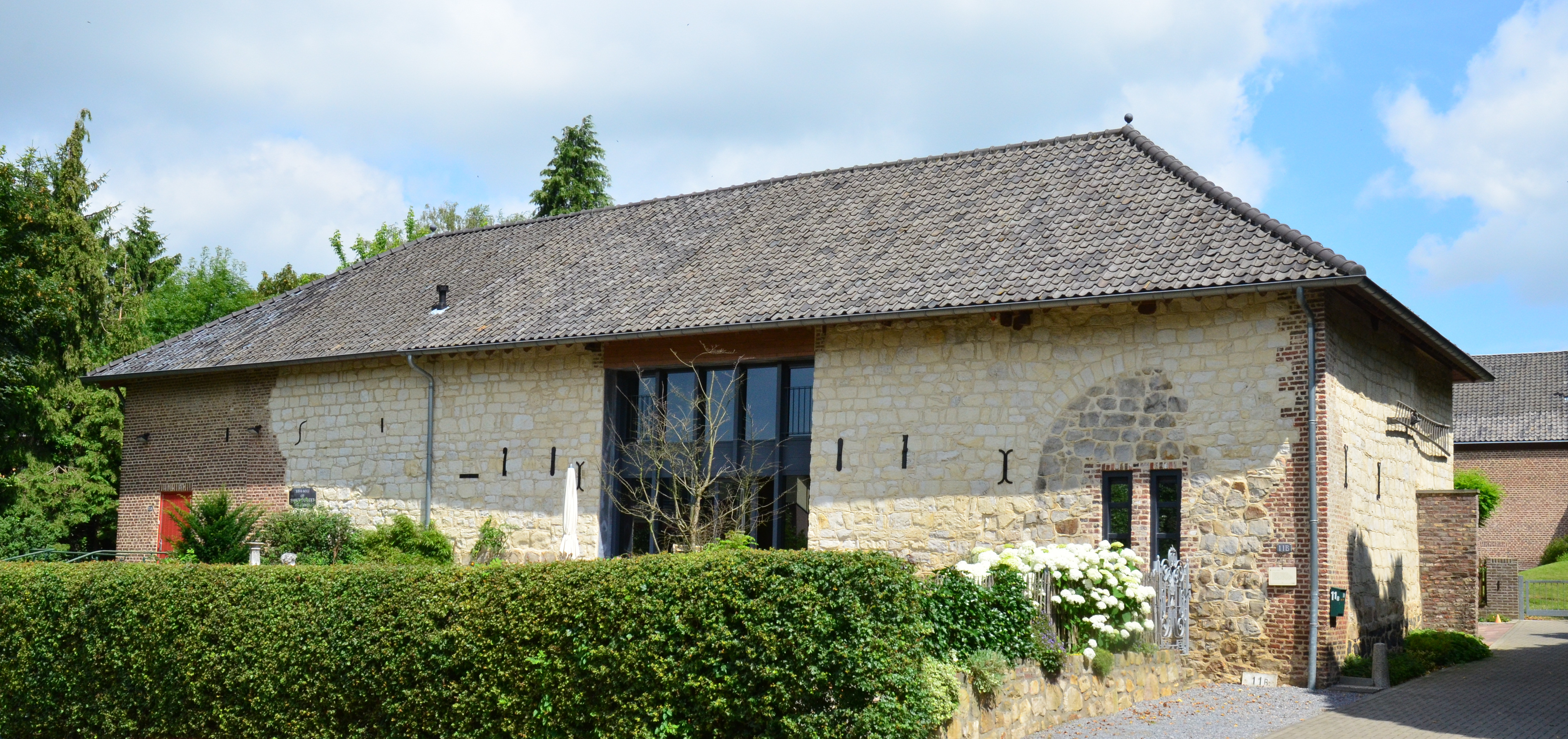 Das ehemalige Gut St. Tolbert, Vaals